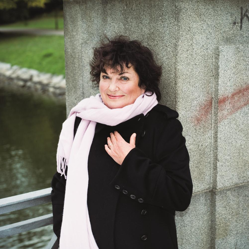 Författaren Viveca Lärn.